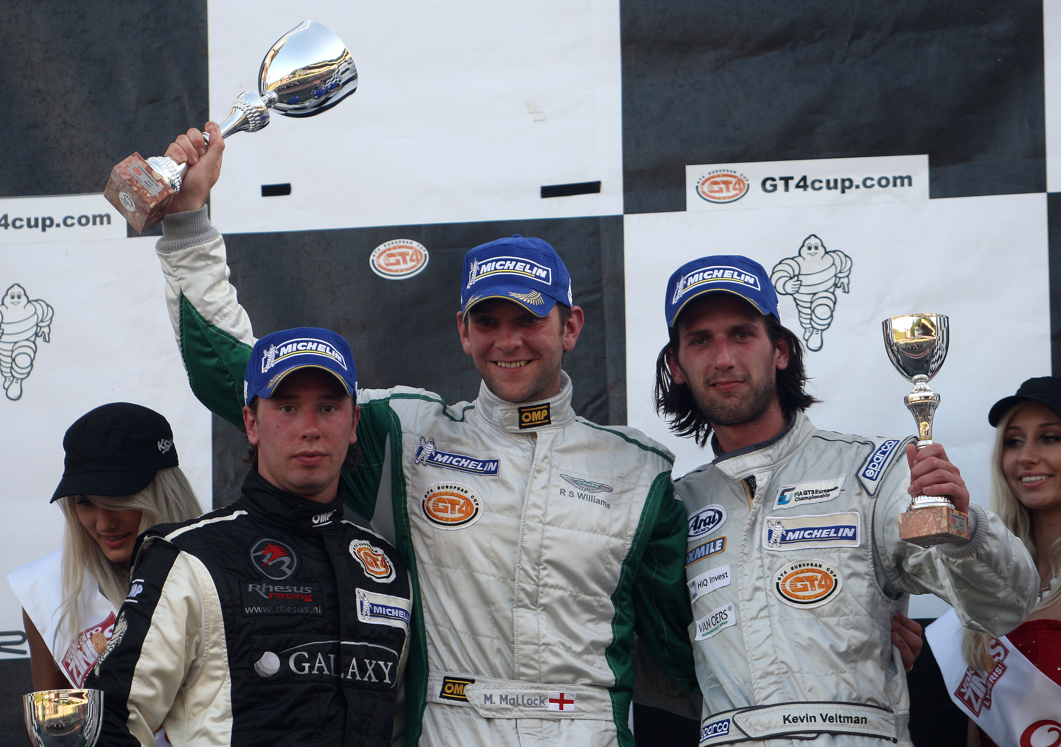 GT4 2010 podium spa